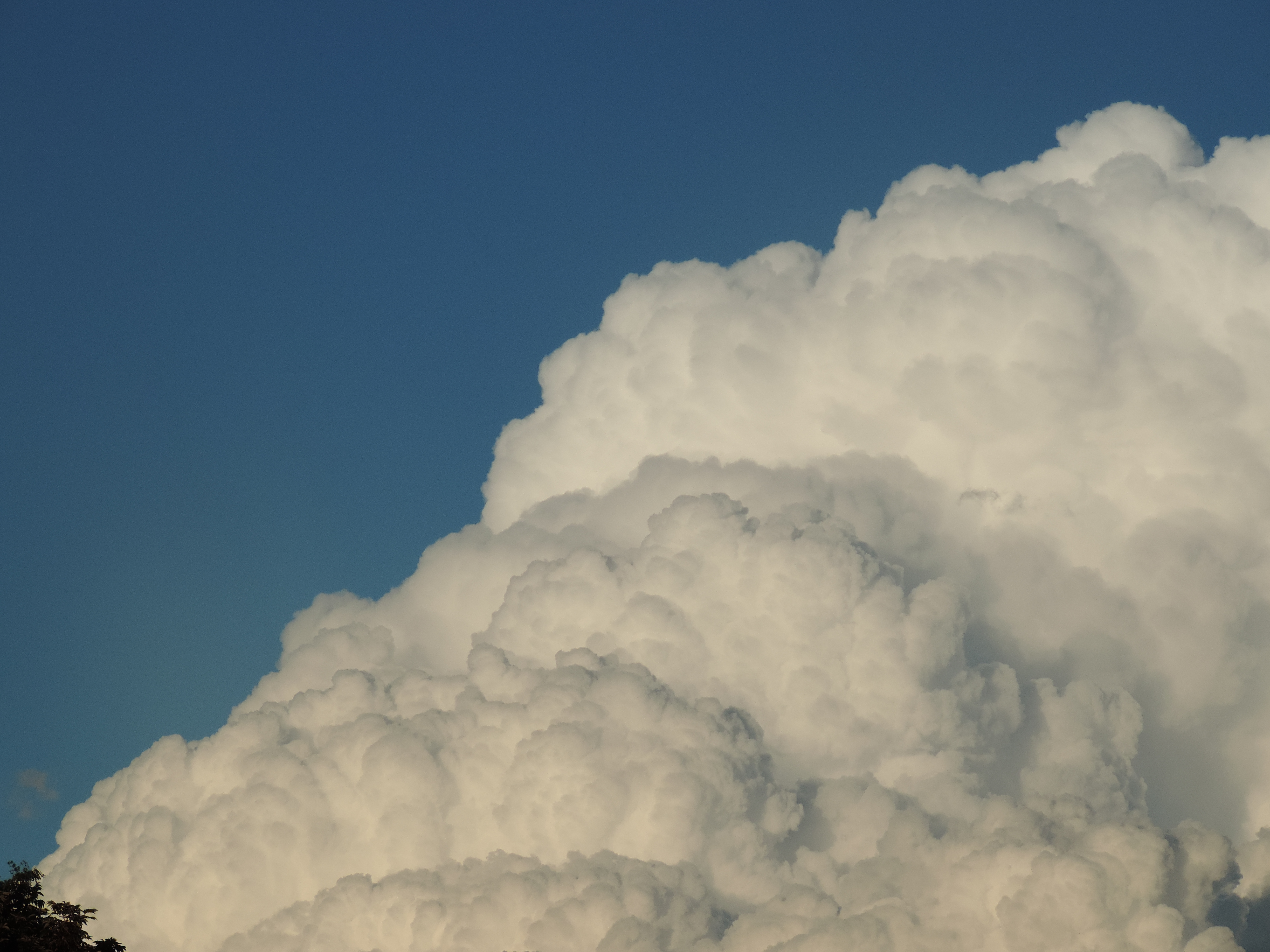 Nuvem Comulus.